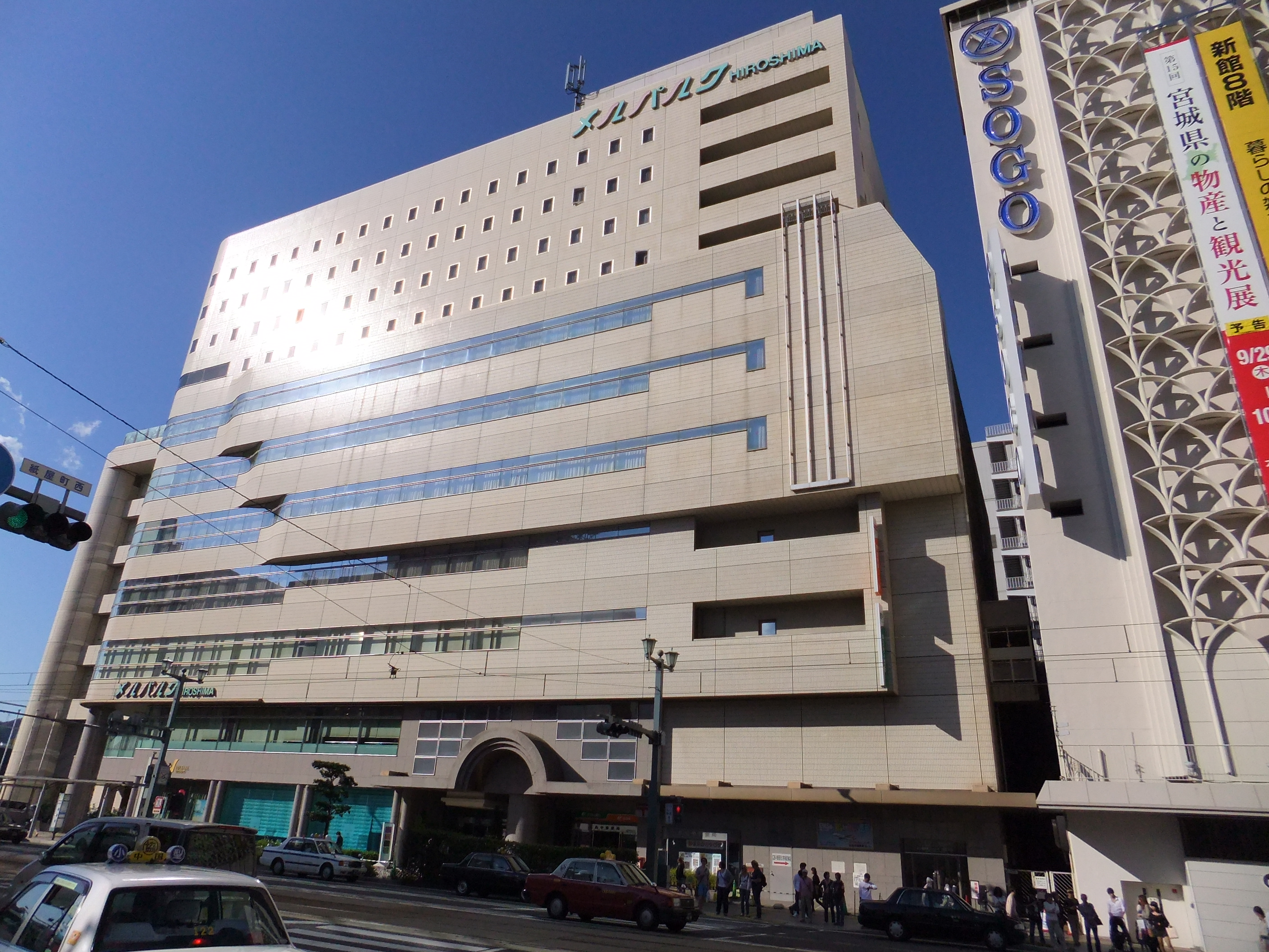 MielparqueHiroshima ・